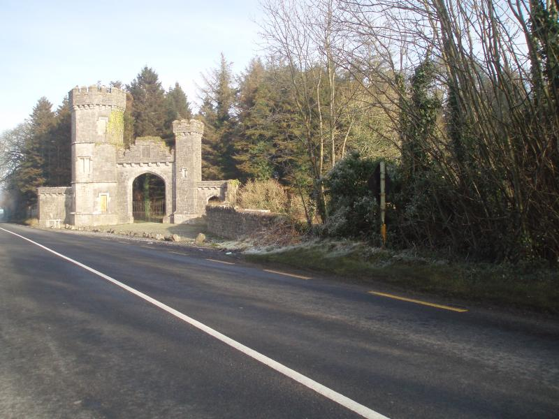 Gavigan 2007